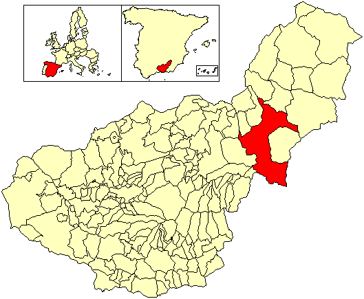 Situación del término municipal de Baza respecto a la provincia de Granada, en España.